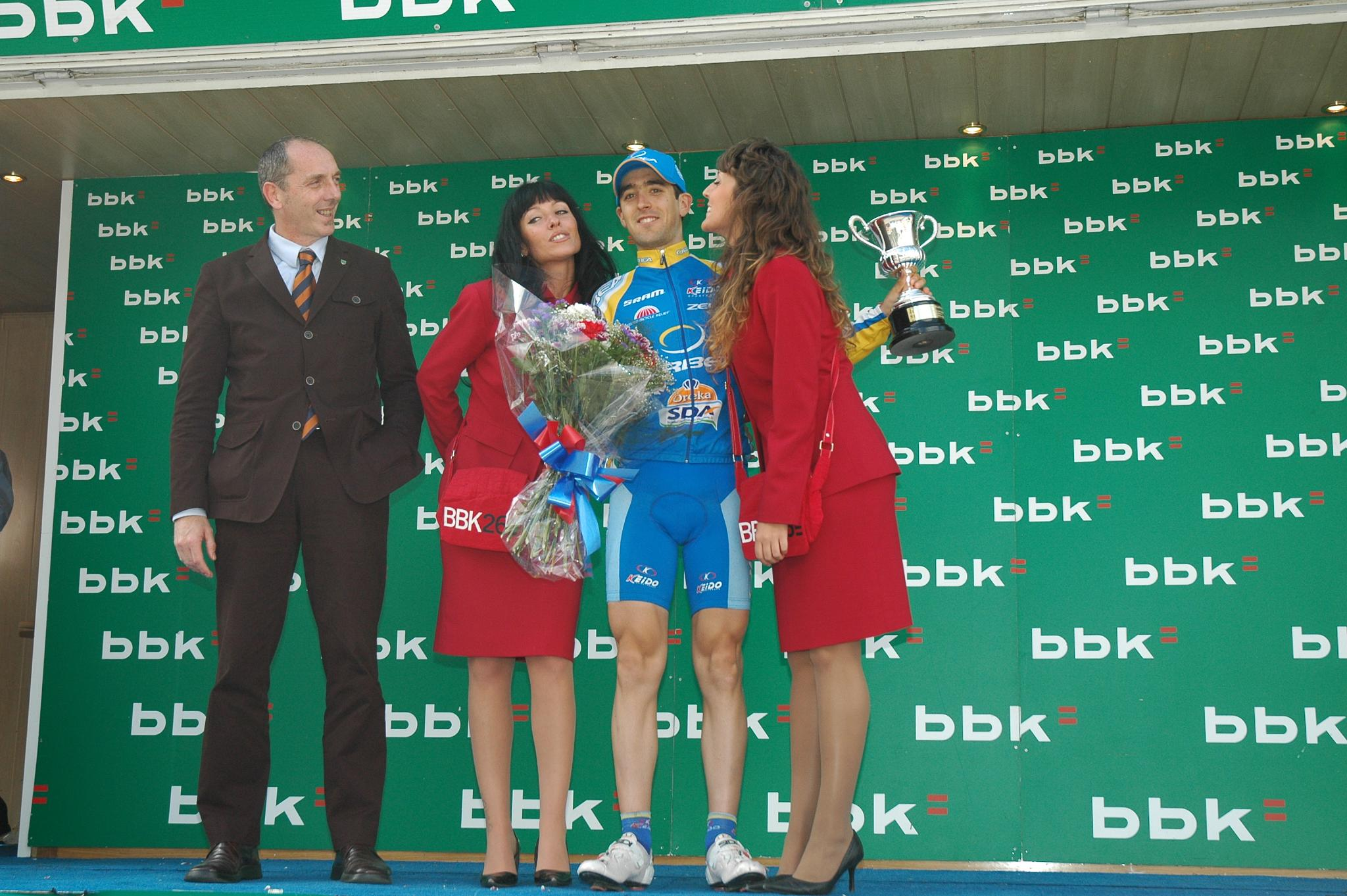 Mikel NIEVE (ORBEA OREKA) primer Neoprofesional, Euskal Bizikleta 2008